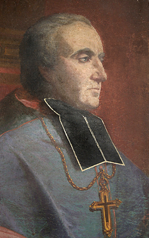 Portrait d'apparat de l'évêque de Tarbes Bertand-Sévère Laurence, détail. Peint en 1860.